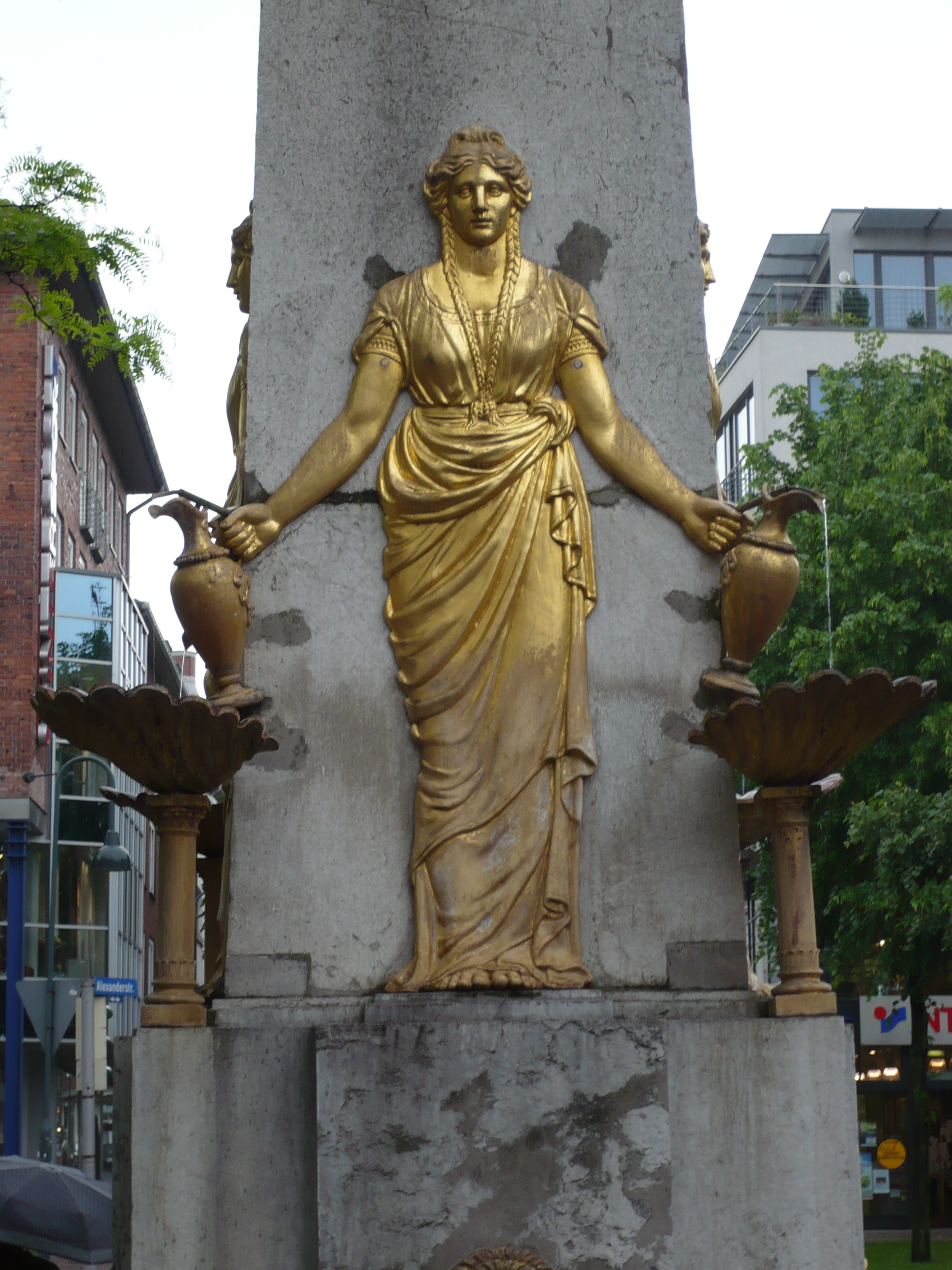 Figur der Hotmannspiif, einem Brunnen in Aachen